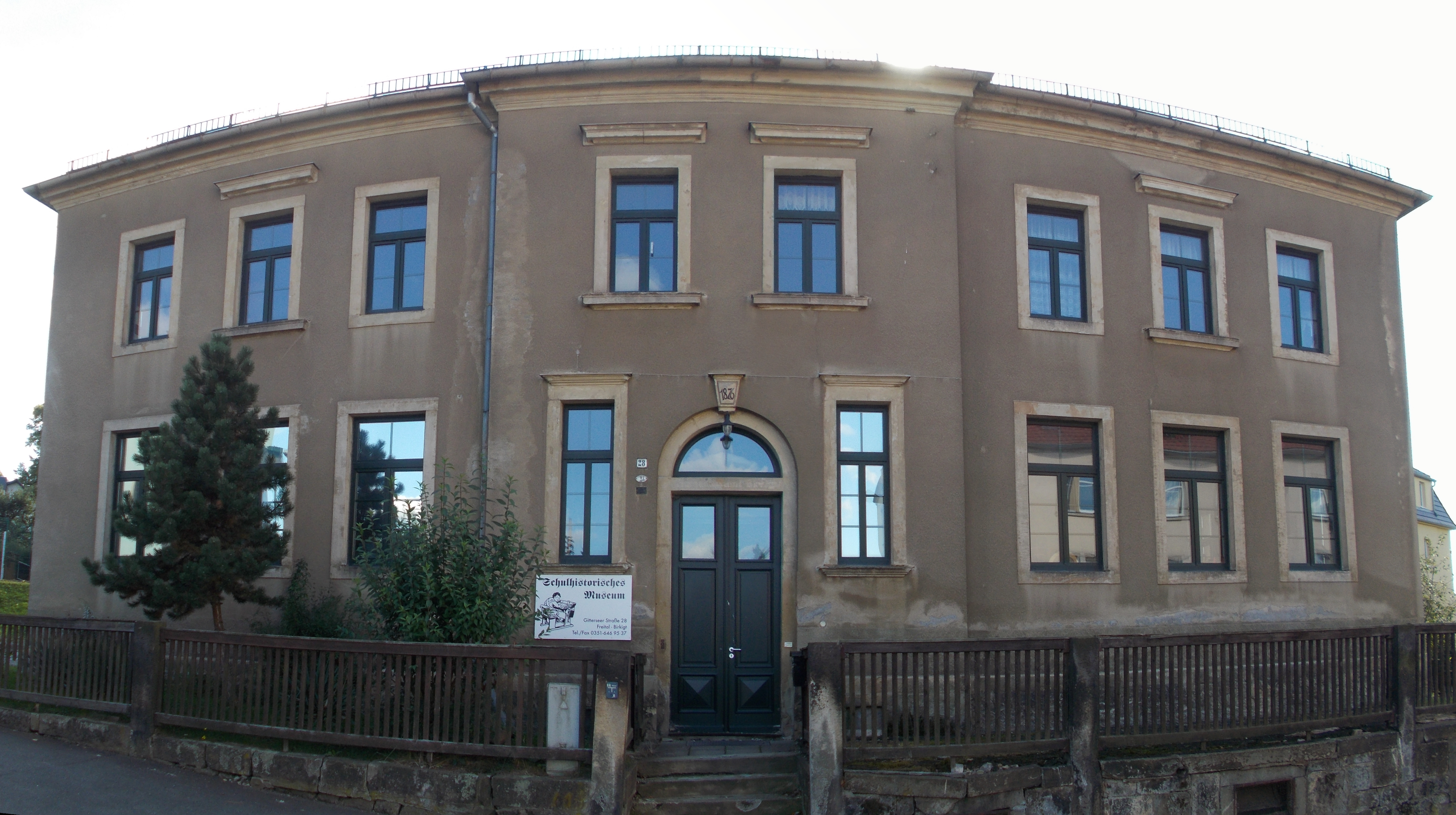 Alte Schule in Birkigt - heute Schulmuseum